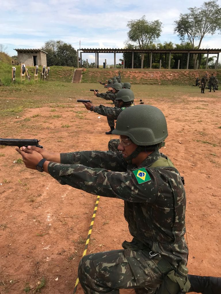 Instrução de tiro de Pistola iMBEL M973 no estande de tiro de Seção de Tiro da ESA